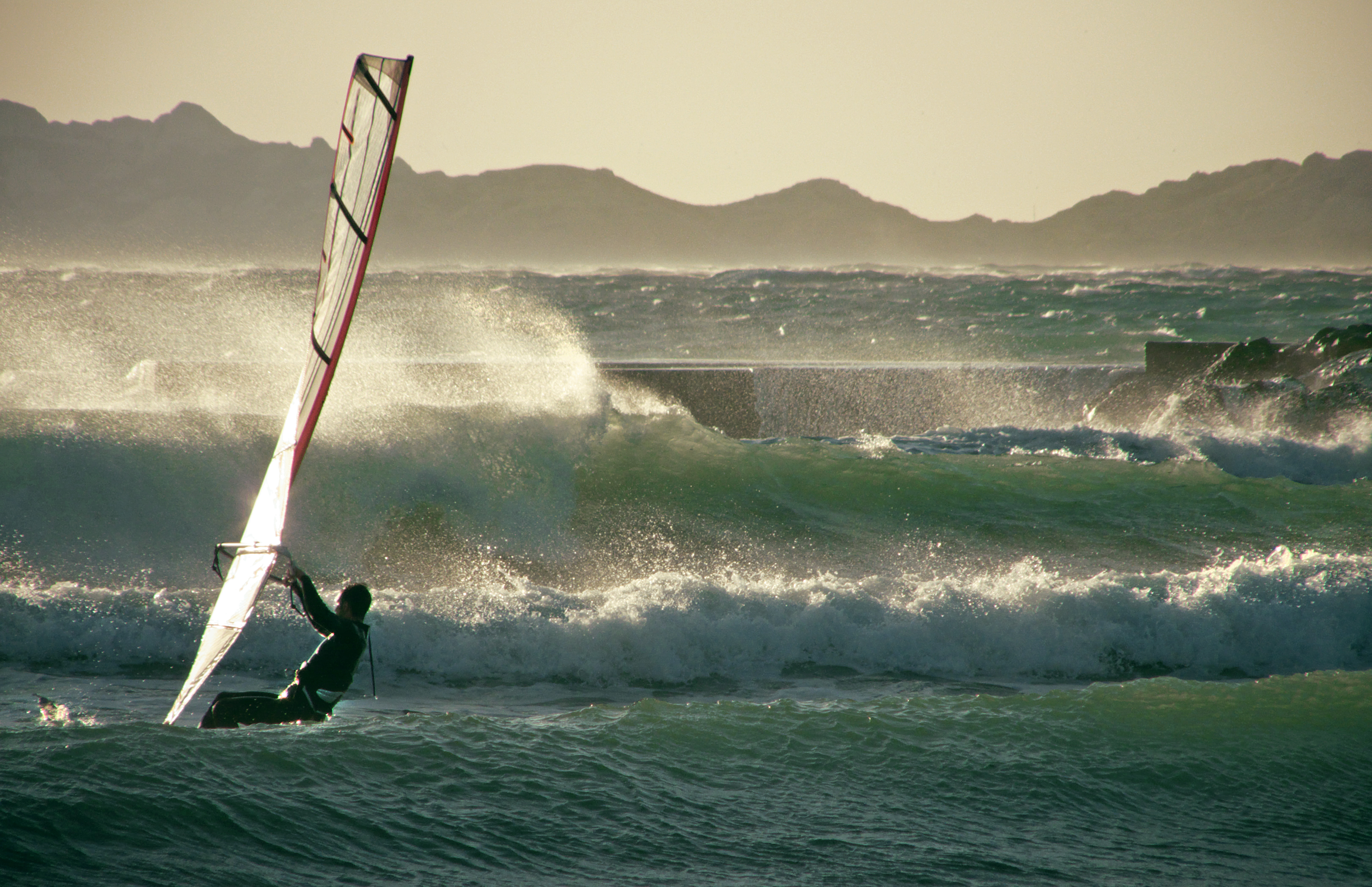 Windsurfer am Plage du Prado, Marseille, bei zunehmendem Mistral